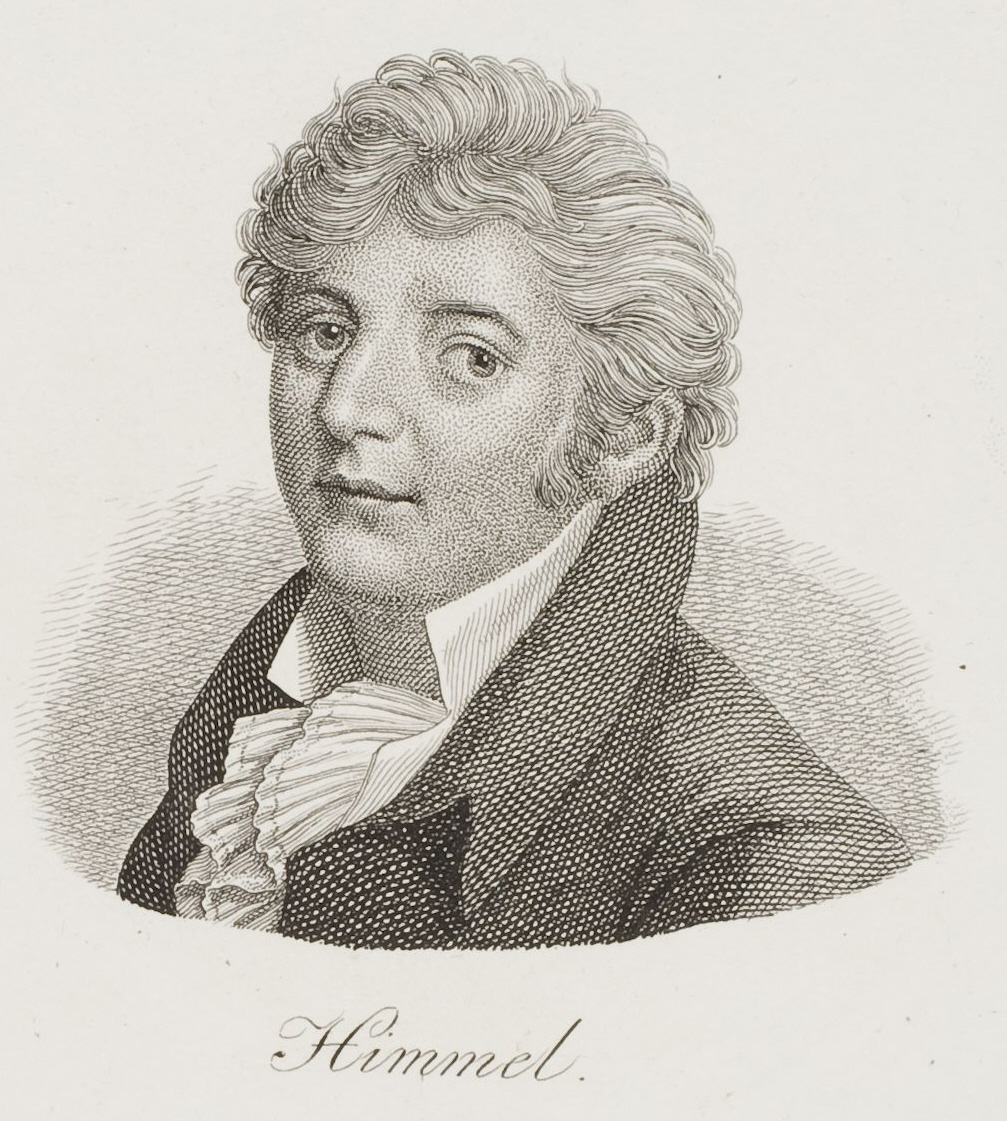 Bildnis Friedrich Heinrich Himmel (1765-1814), Kupferstich; Punktierstich